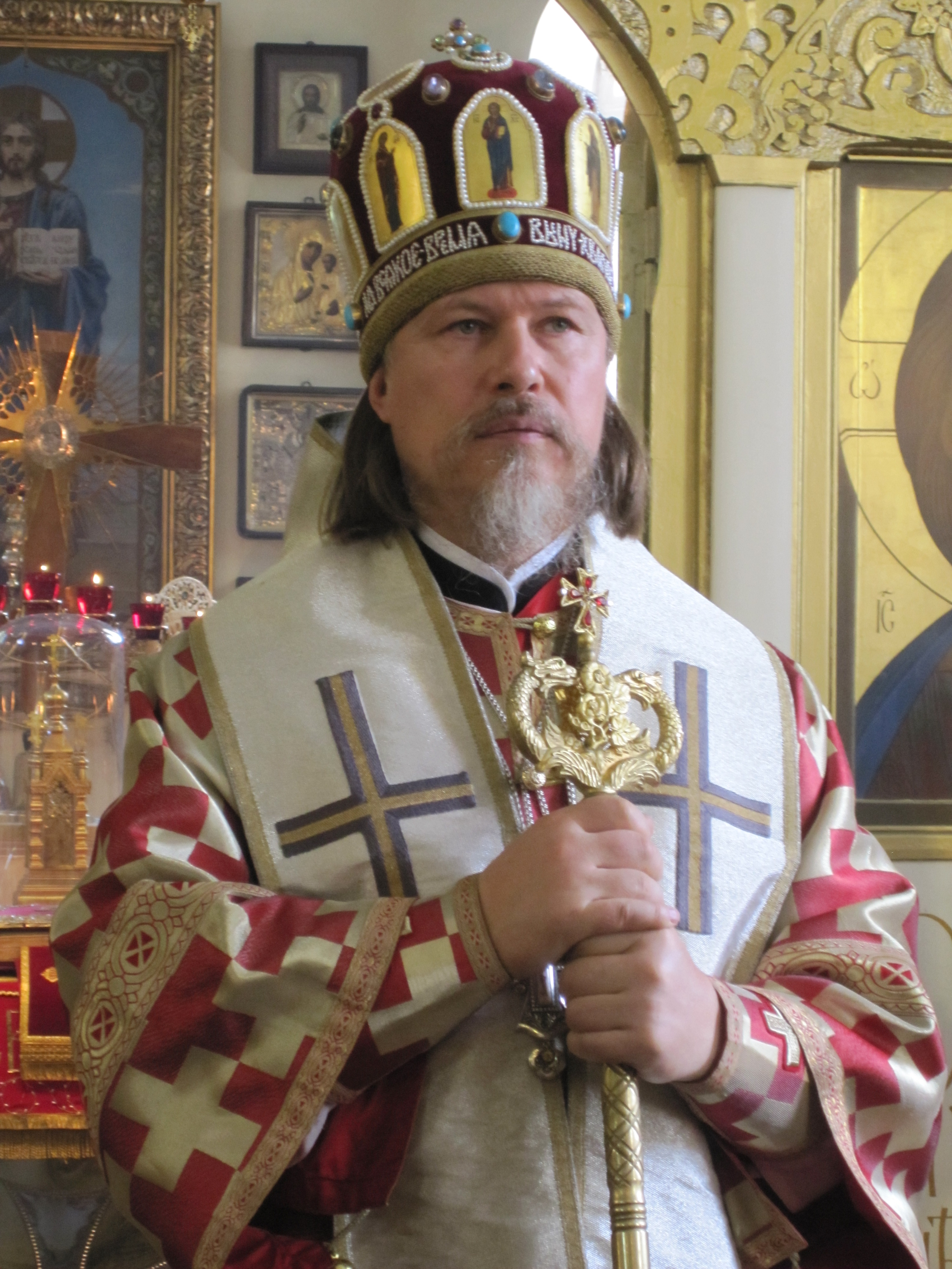 Архиепископ Марк (Головков)